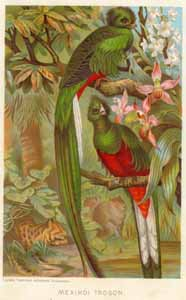 Trogonok Brehm Az állatok világa c. művéből. Vastagh Géza munkája.